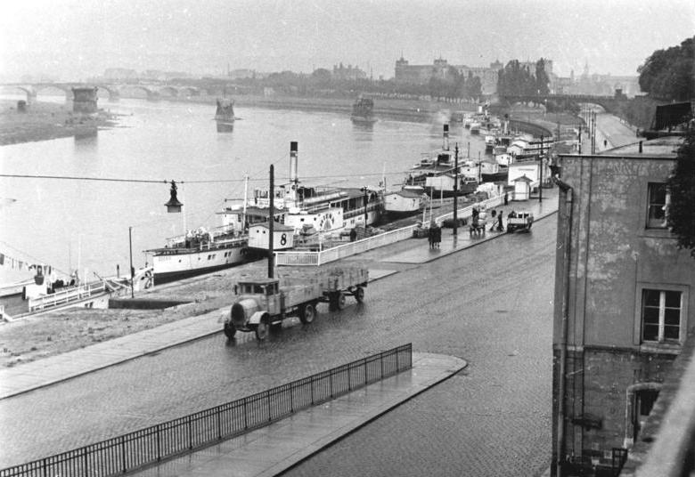 Dresden, "Weiße Flotte", Ausflugsschiffe Zentralbild Schmidtke 7.8.1952 Blick von der Brühlschen Terrasse. (Dresden)